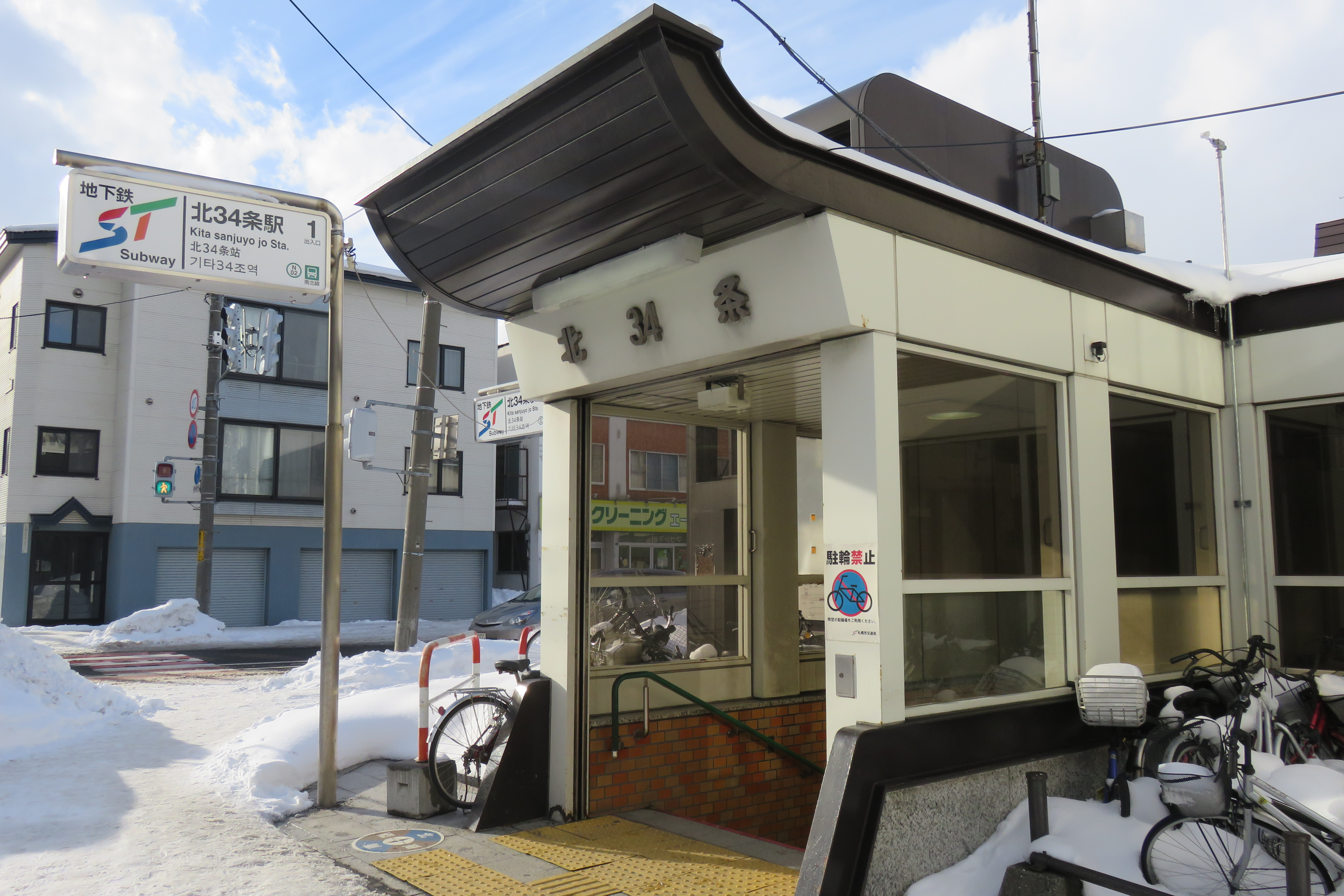 北34条駅1番出入口